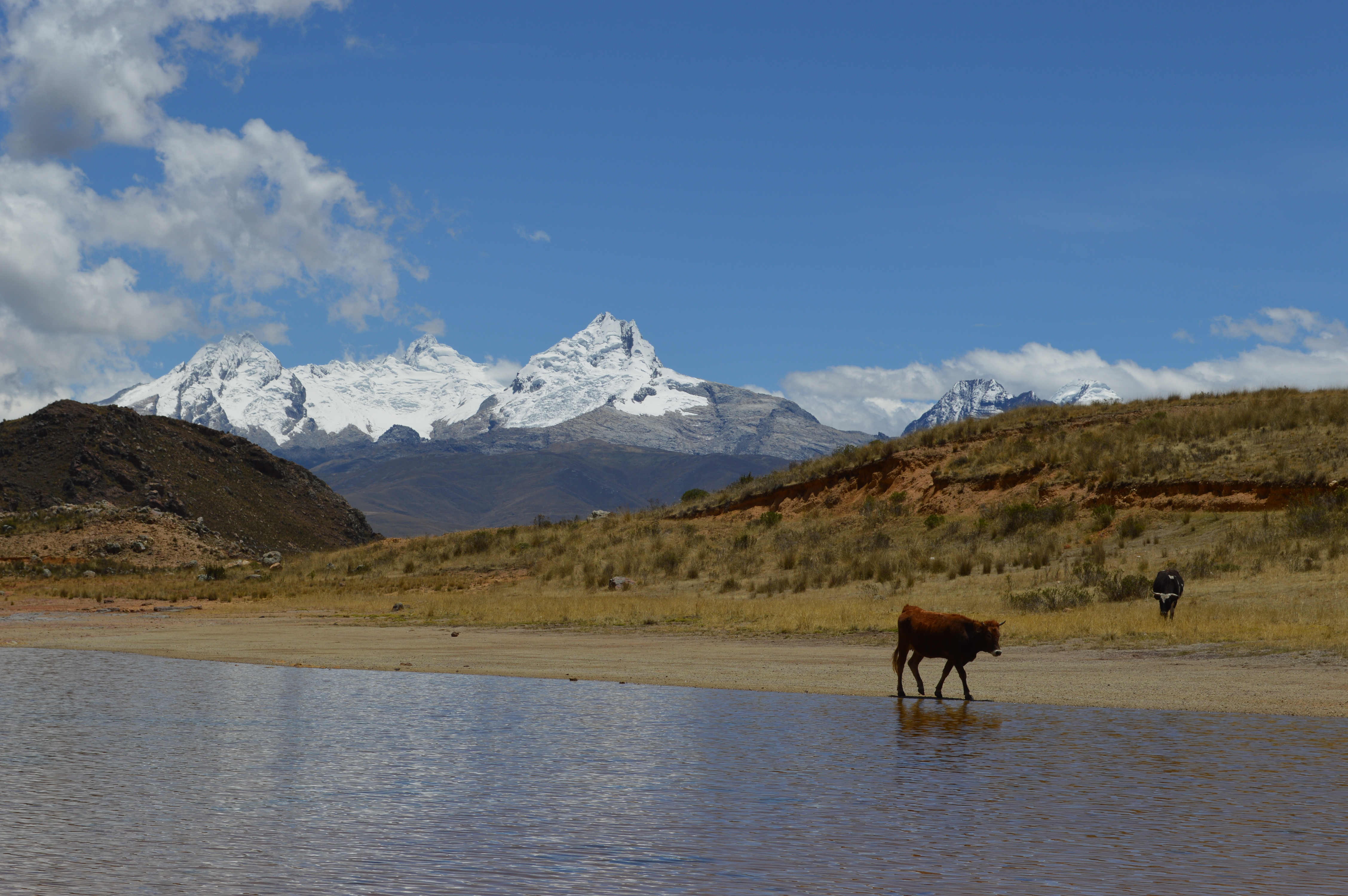 La laguna Antacocha es una laguna en la Cordillera Negra. Se ubica dentro del distrito y provincia de Recuay, región Áncash en Perú.